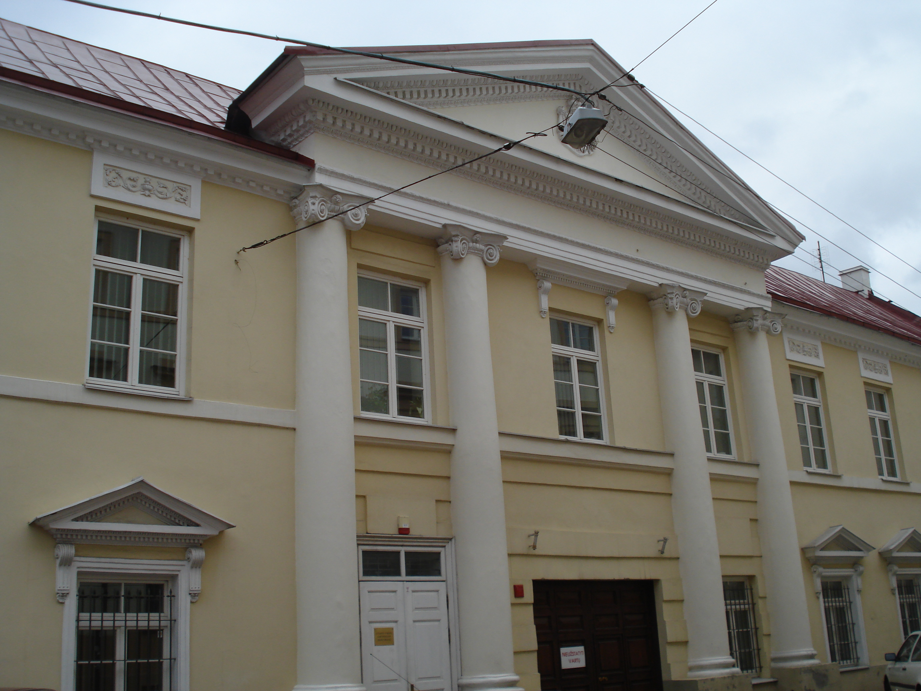 Sulistrowski Palace in Vilnius (Skapo street)